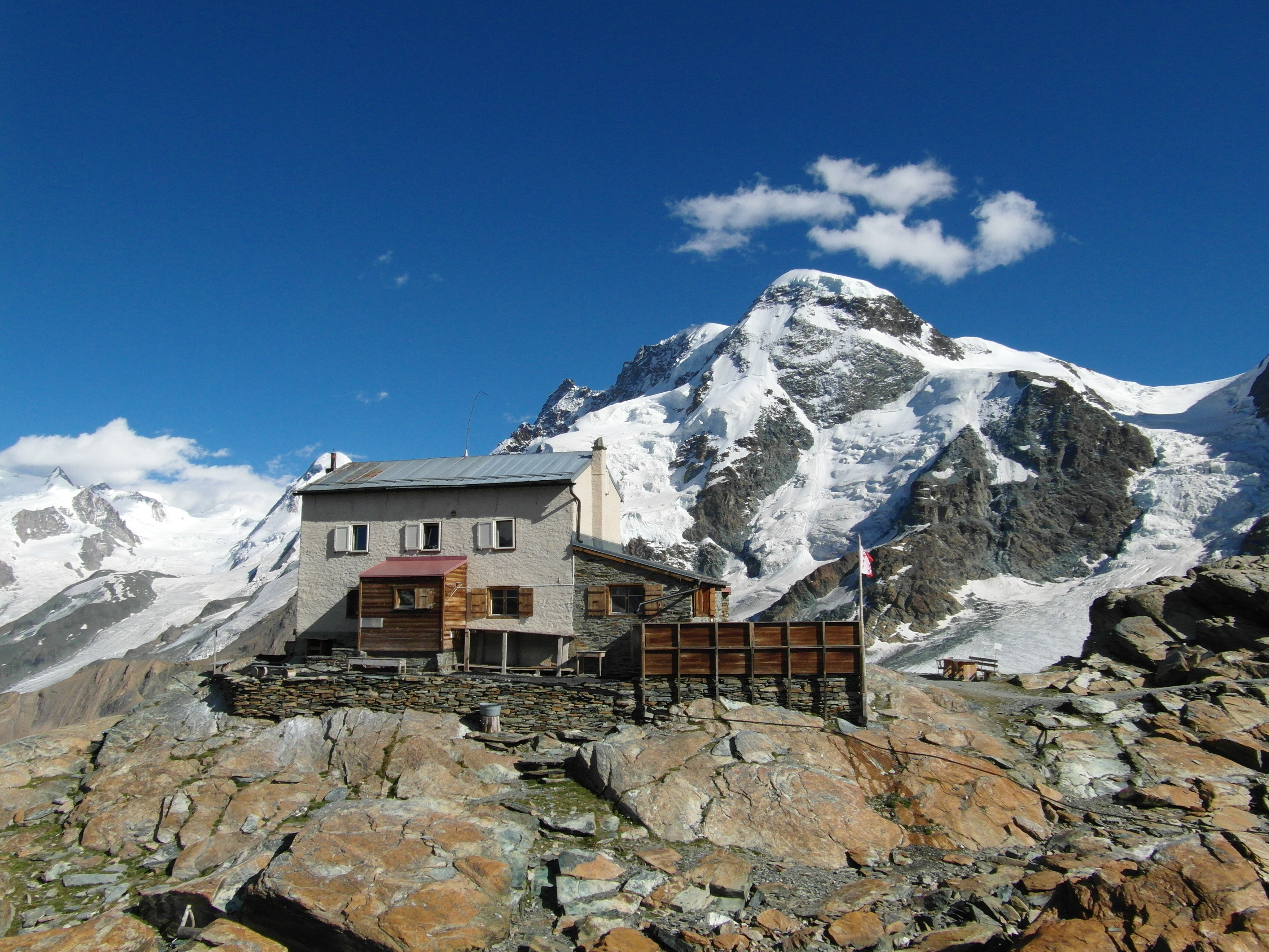 Gandegghütte (3030MüM) oberhalb von Zermatt von Nordwesten. Im Hintergrund (rechts) sieht man das Breithorn (4164 MüM)